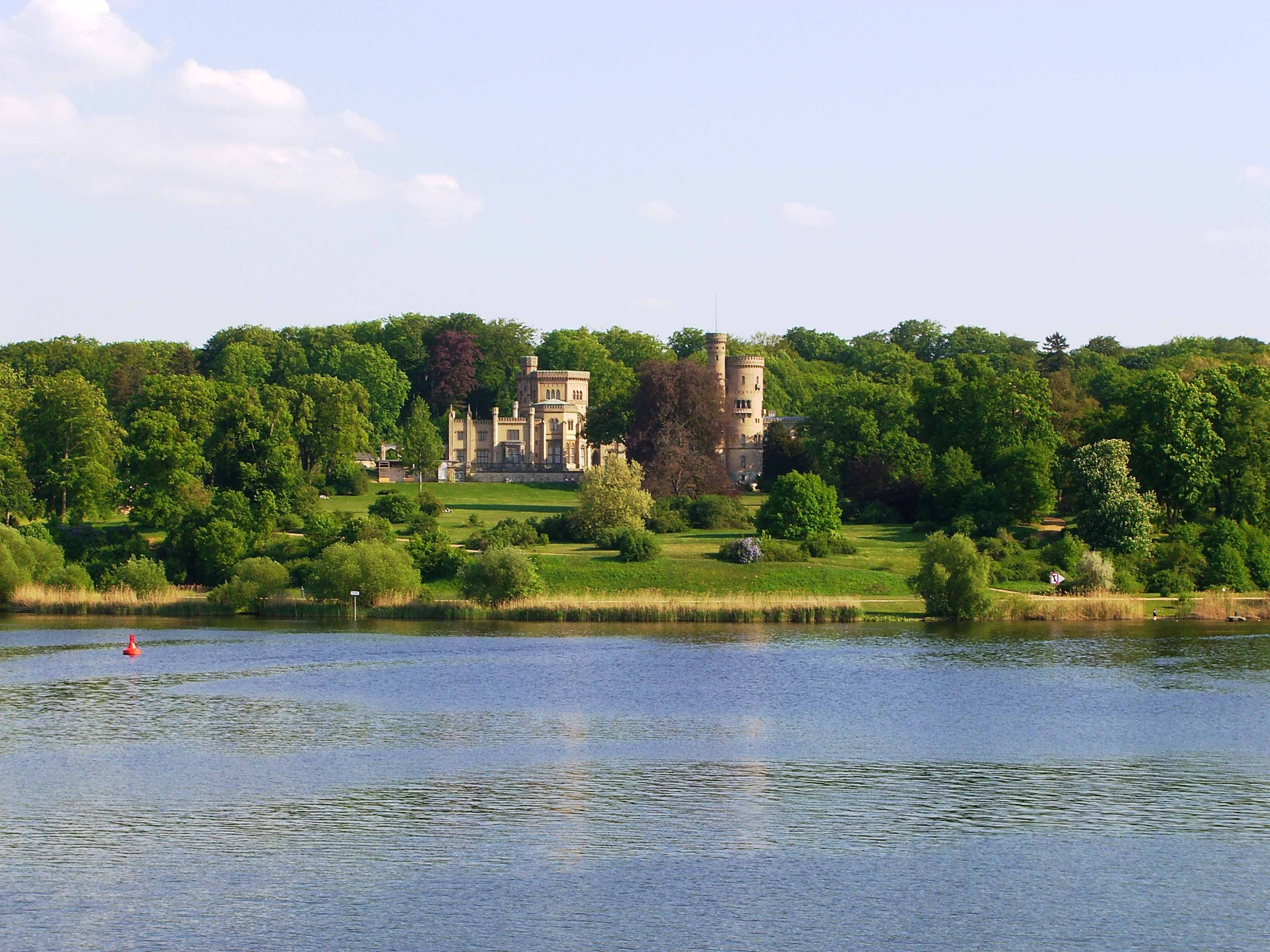 Babelsberg Castle in 2006